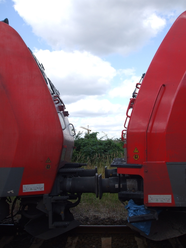 Vergleich der Kopfformen einer 185.1 und einer 185.2